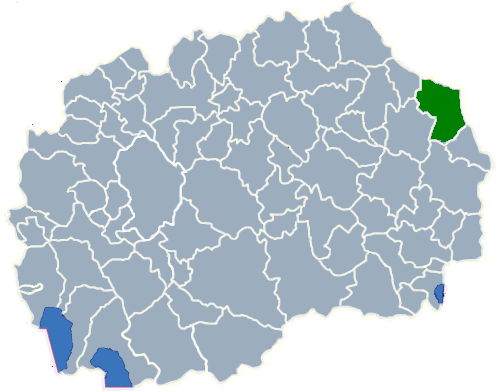 Map of Opština Delčevo (Делчево)